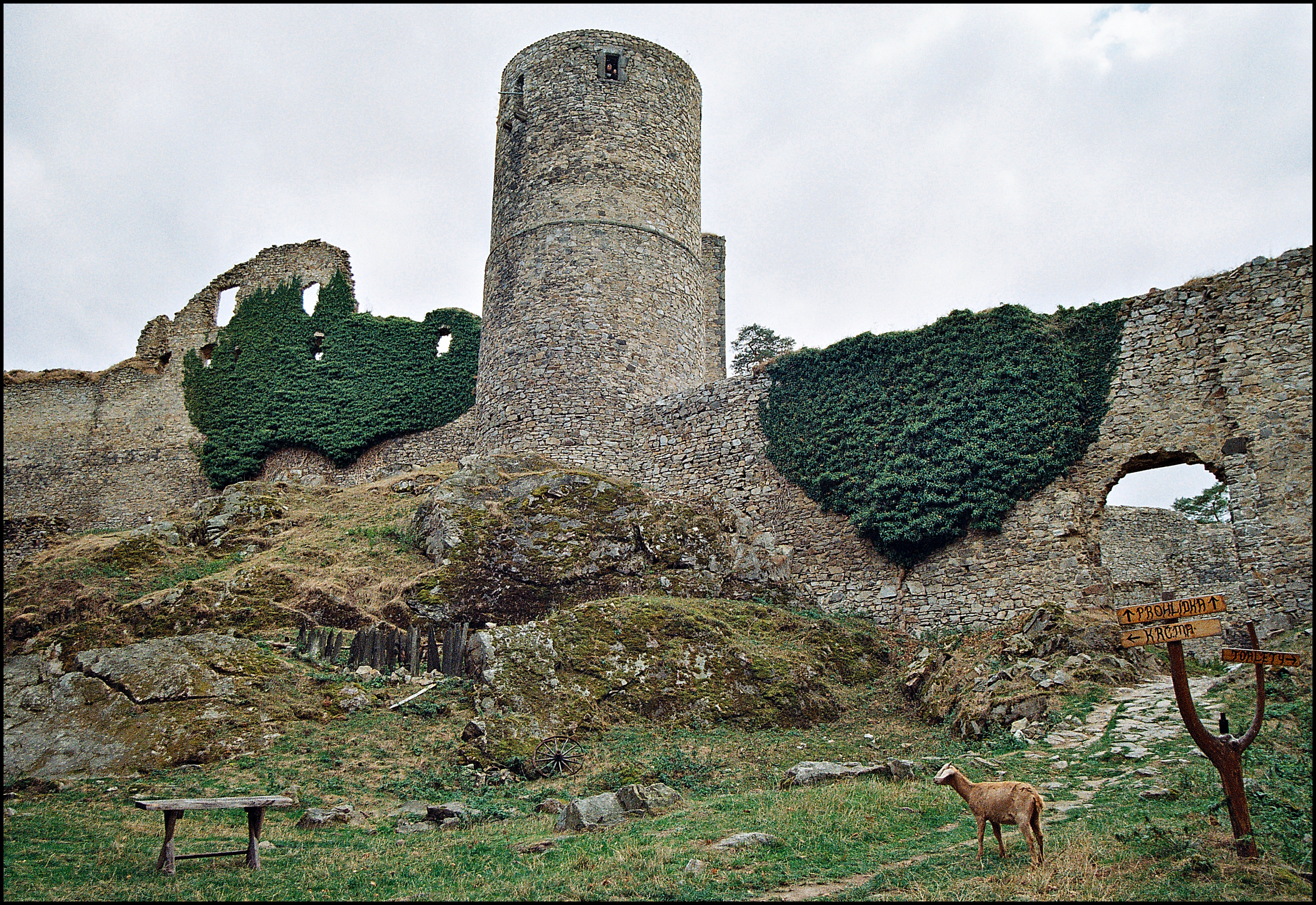 Pohled z prvního nádvoří.